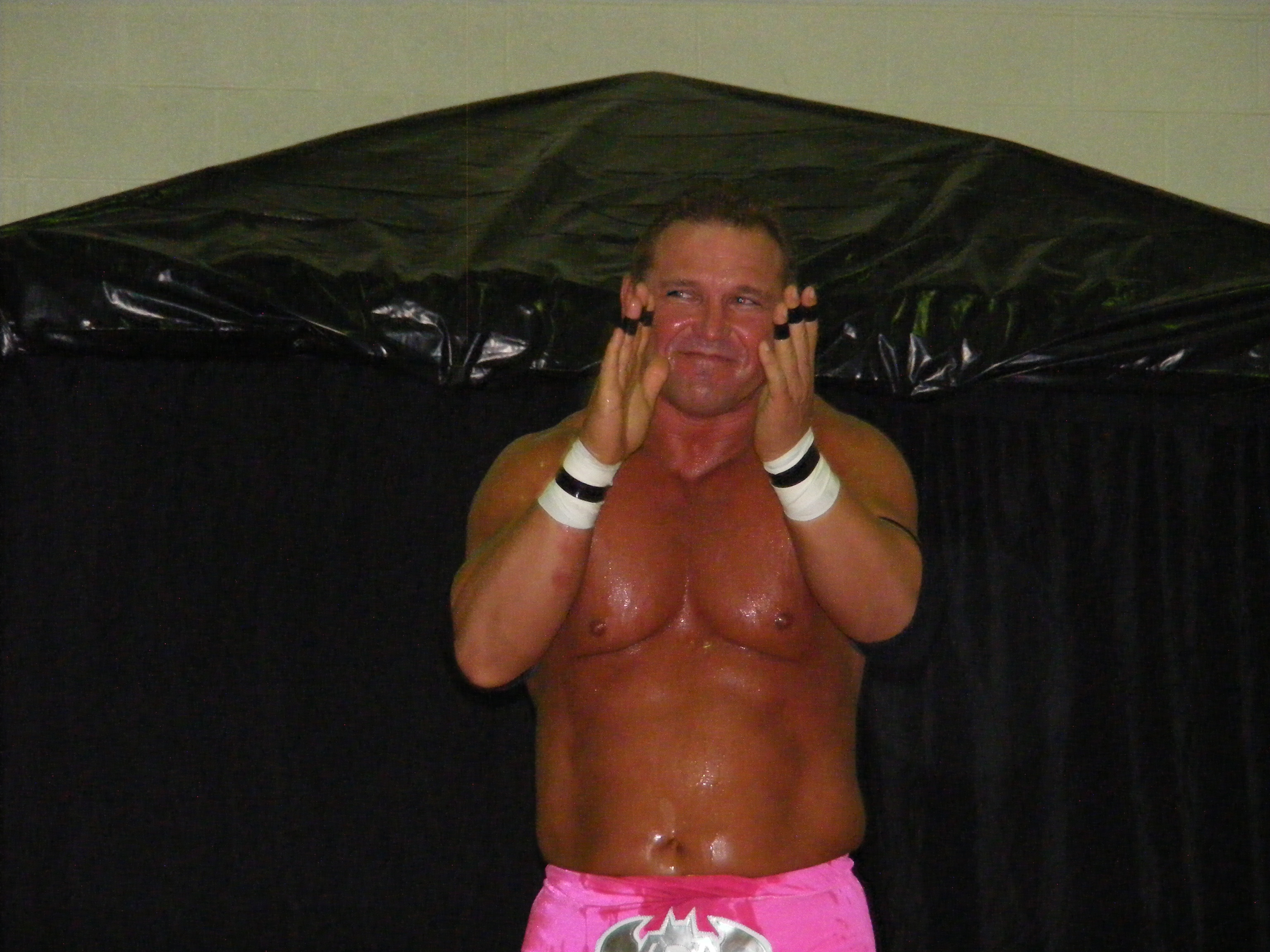 Le catcheur Tim Storm en 2012.